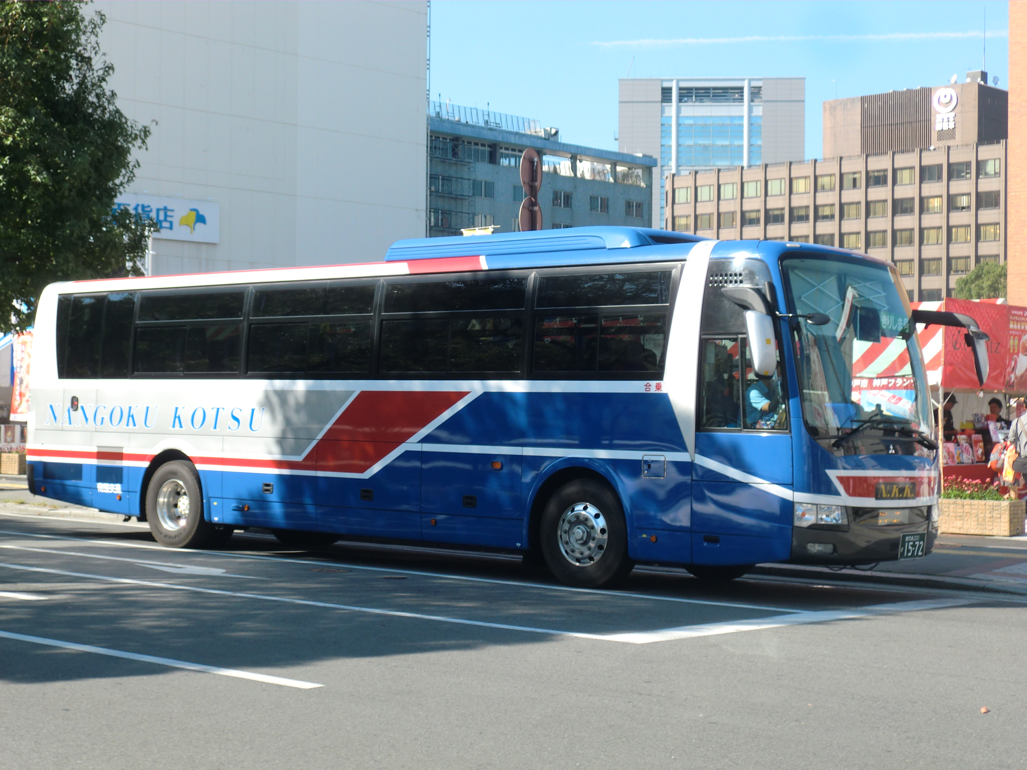 南国交通の高速バス（熊本交通センター付近で撮影）